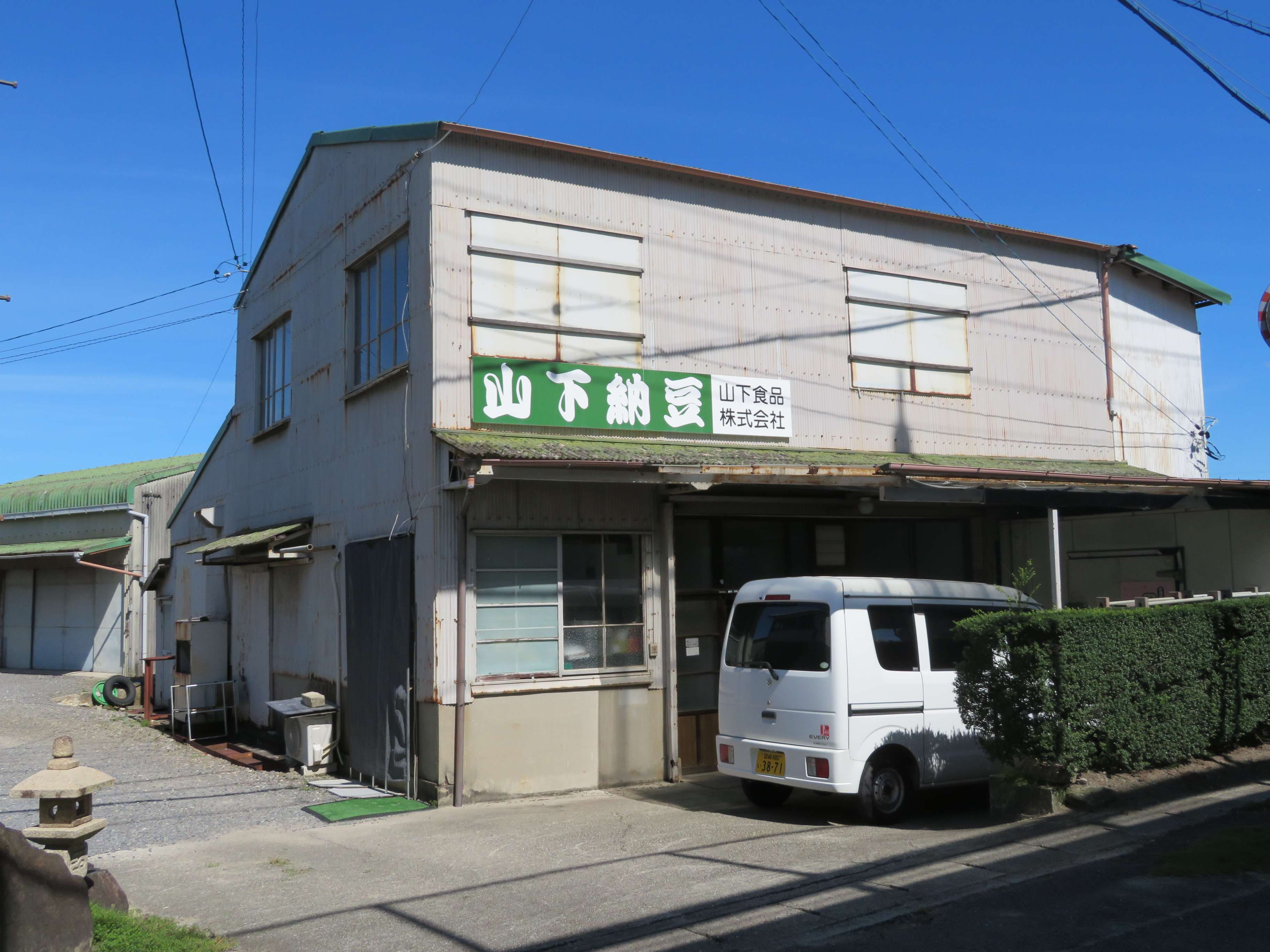 山下食品（岡崎市暮戸町）